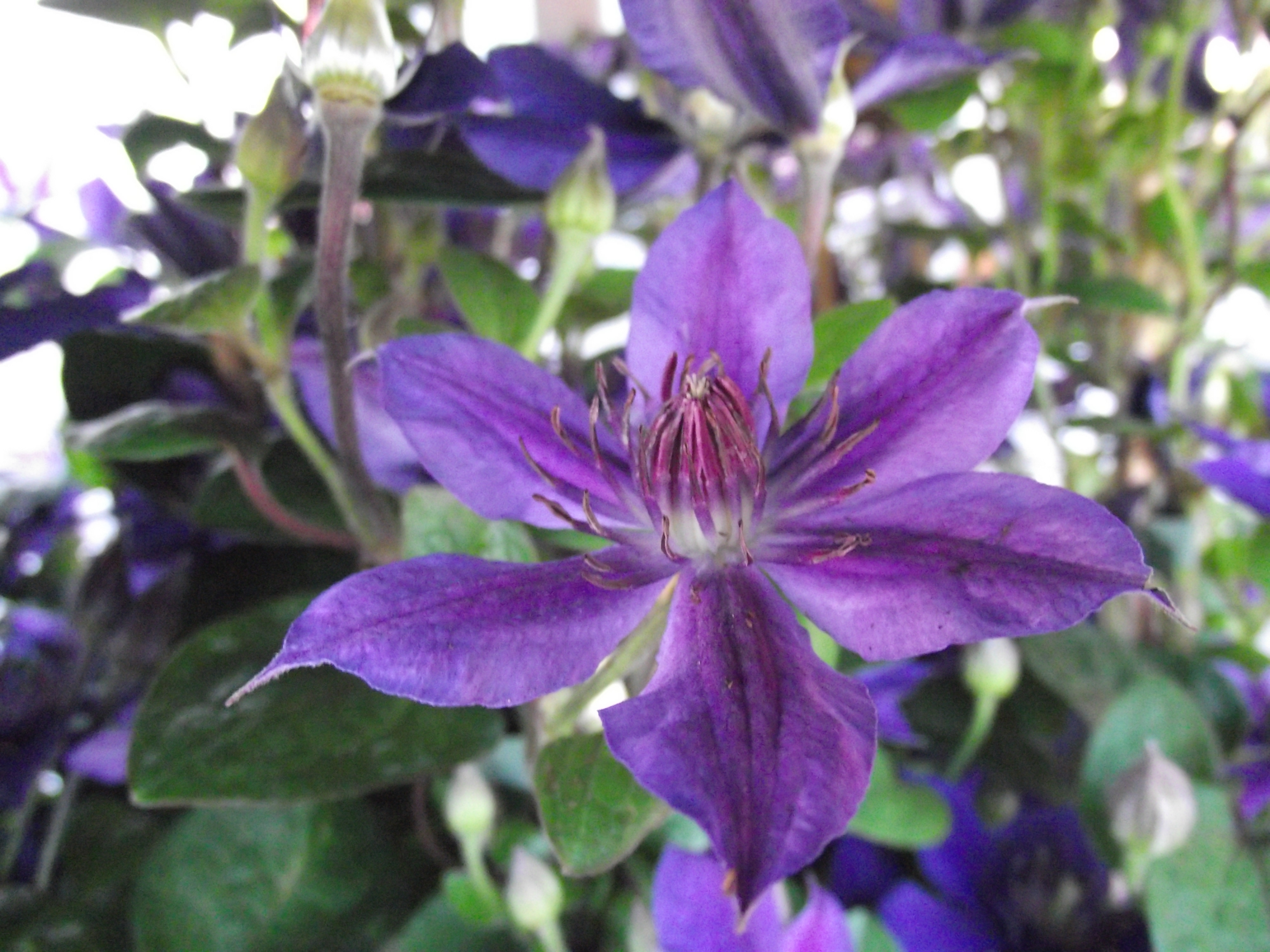 clematite patens mon amour zomoa